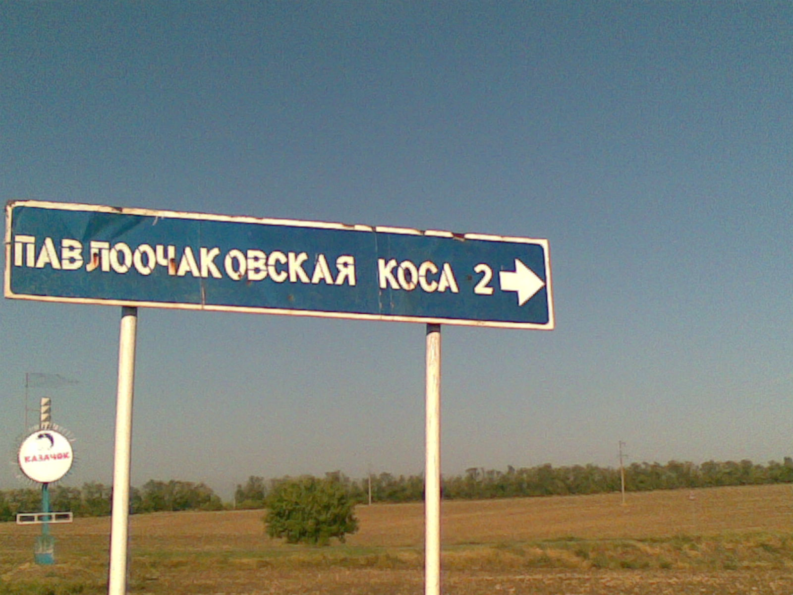 Дорожный указатель, установленный на повороте с трассы "Азов-Порт-Катон" на Павло-Очаковскую косу. Фотография сделана лично Залесским Владимиром Владимировичем.